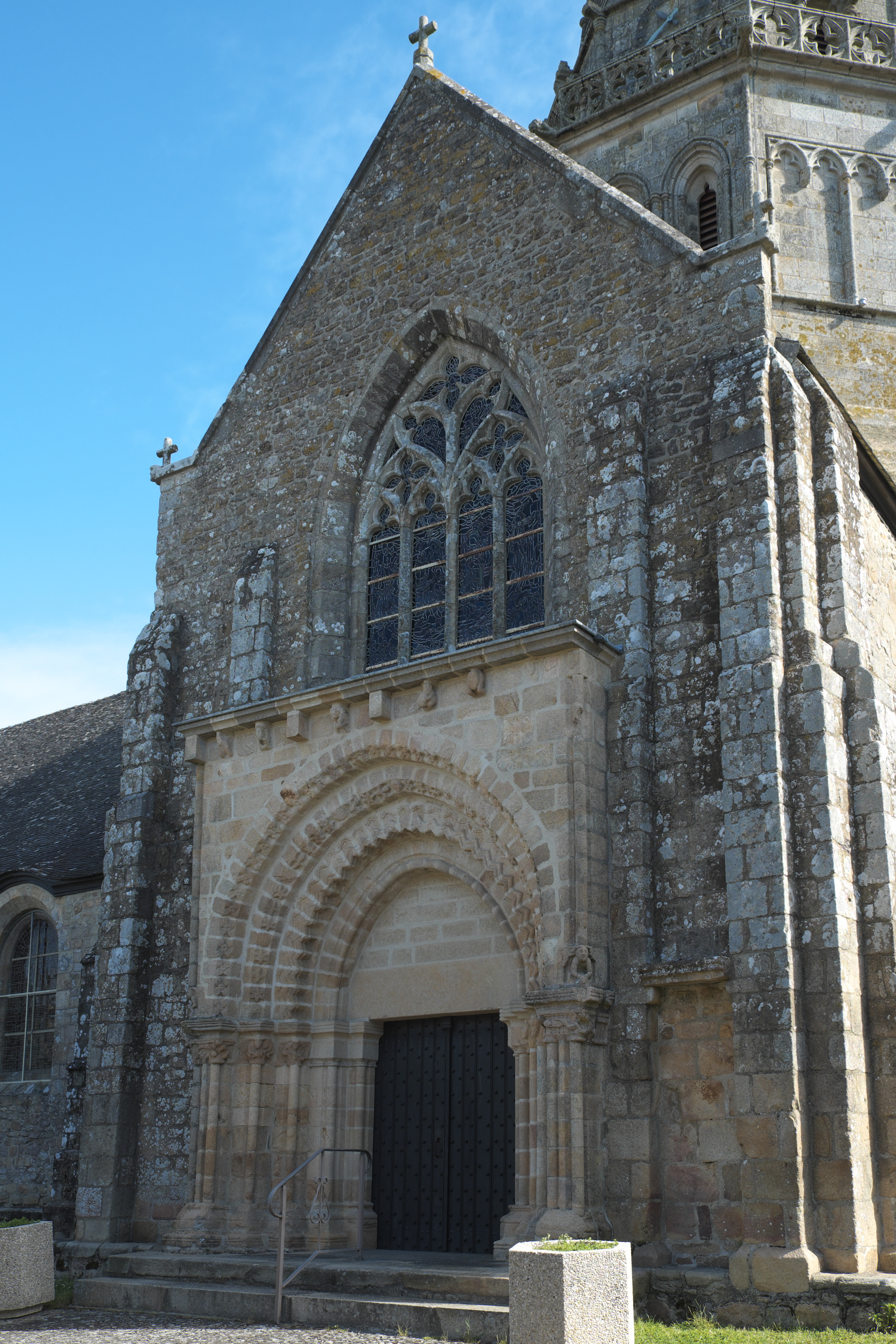 Kirche Notre-Dame-de-Joie in Merlevenez im Département Morbihan (Region Bretagne/Frankreich), Südportal